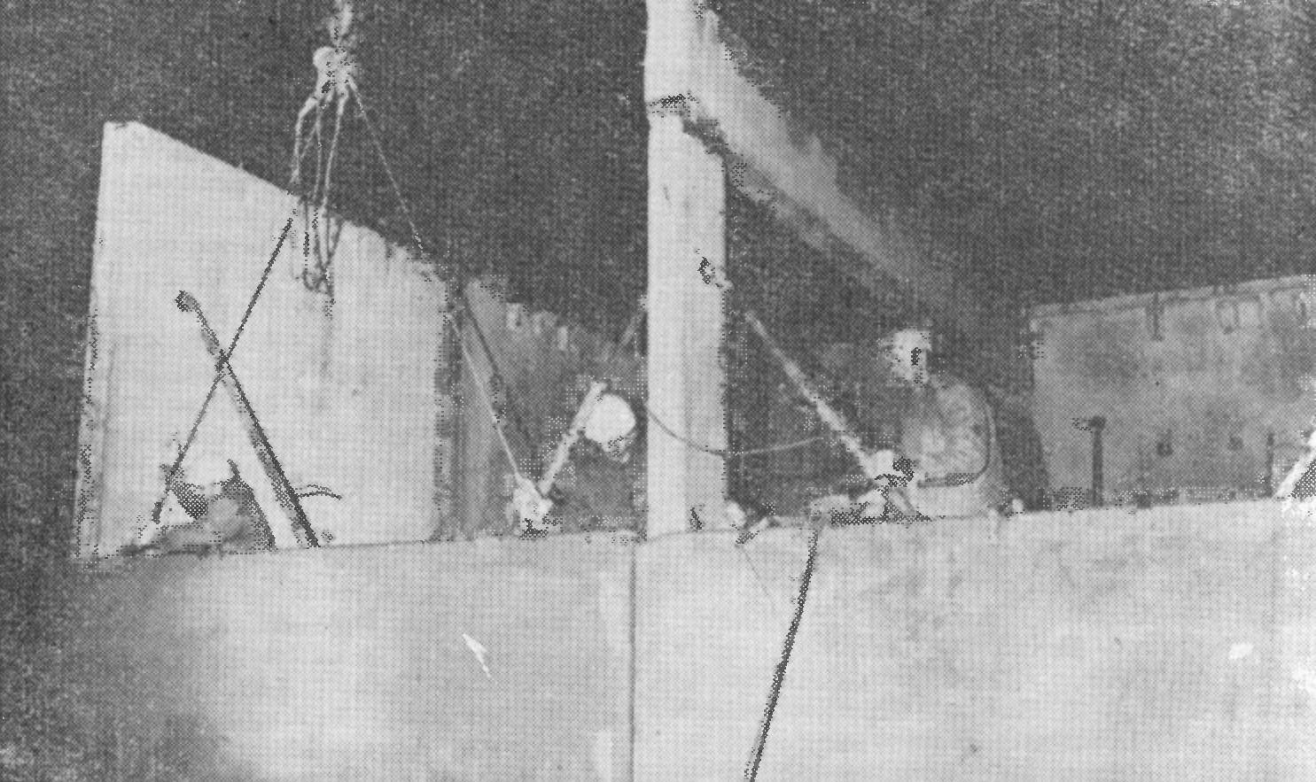 Osiedle Czecha - blok nr 9. 23 listopada 1976